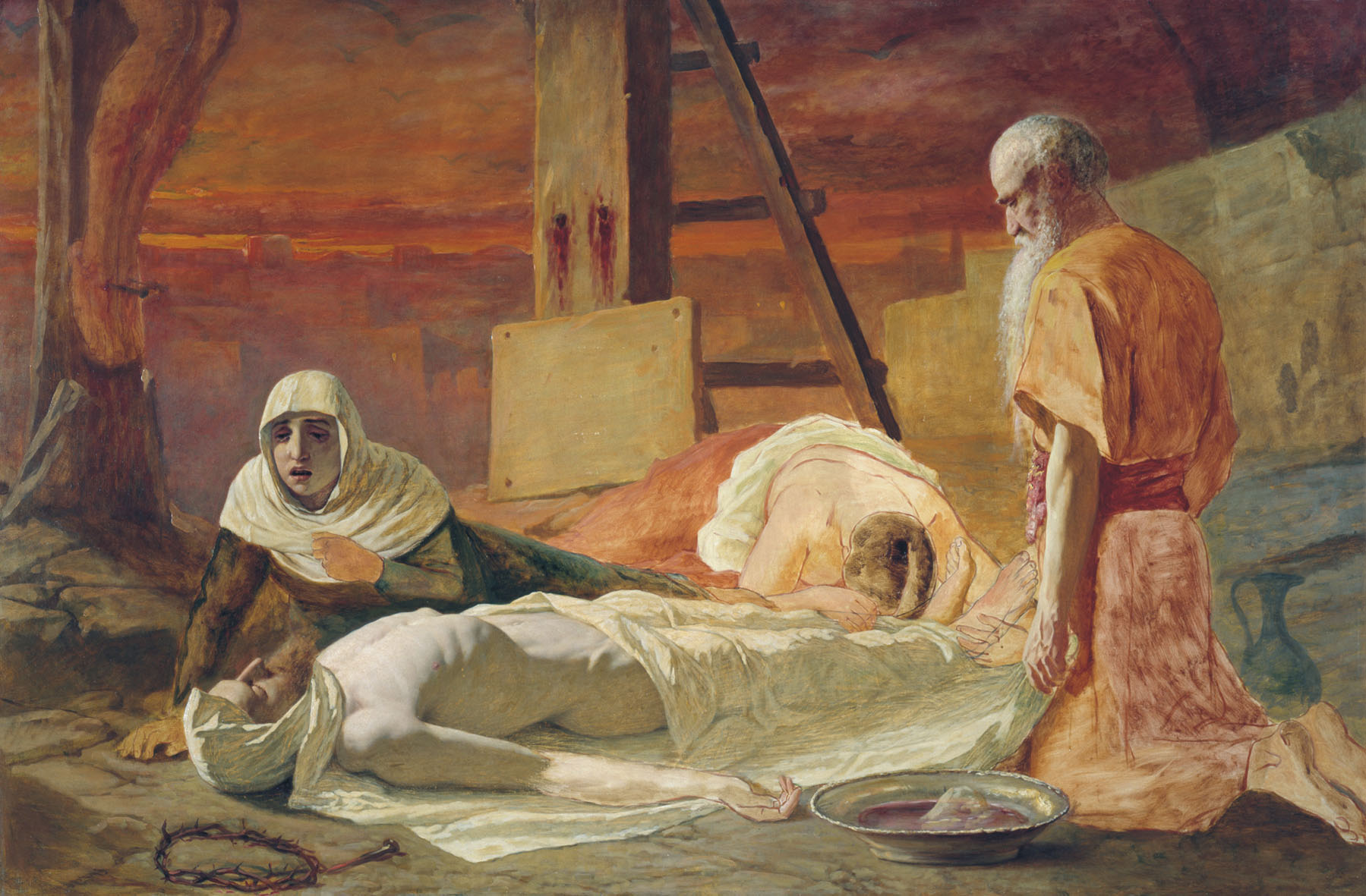 Снятие с креста Deposition : Mary, Mary of Magdala and Joseph of Arimathea have been preparing Christ's body for entombment. Christ rests on the ground, his livid body a shocking contrast with the blood-red sky in the background, the crown of thorns and the nail from his feet lying next to him. A mourning Mary looks as if she could barely sit up. Mary of Magdala makes not effort to rise and lies holding his feet and burying her face in grief. Joseph has straightened up after cleaning the body and his ramrod straight back parallels the crosses while offering a contrast with the bowed, almost crushed female figures and denoting the upright man. The basin, full of Christ's blood, may evoke the legend according to which Joseph filled a vessel, that was later to be known as the Holy Grail, with Christ's blood.